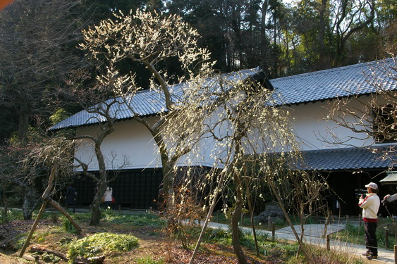 東慶寺の松ヶ岡宝蔵。